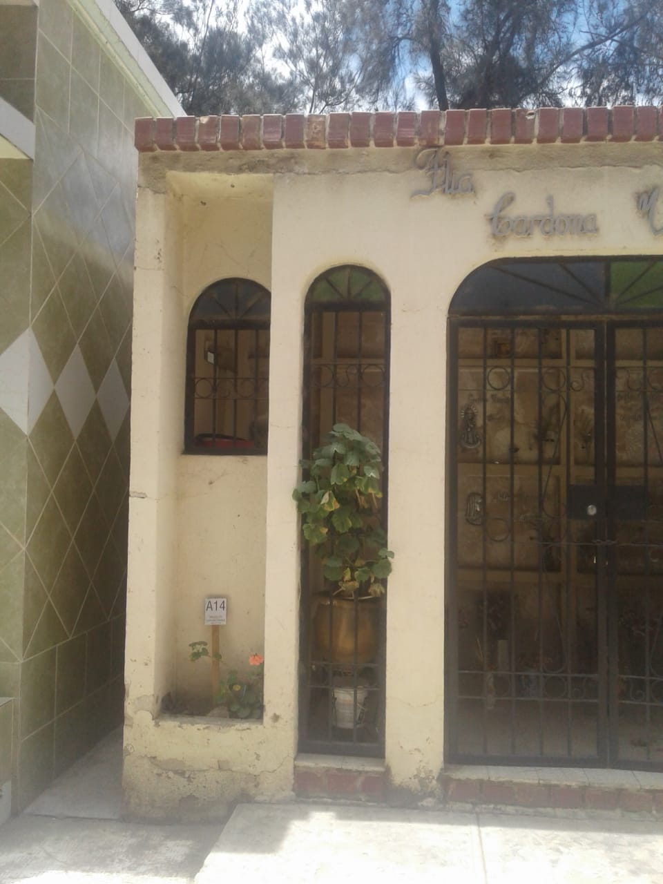 esta en el cementerio general de cochabamba